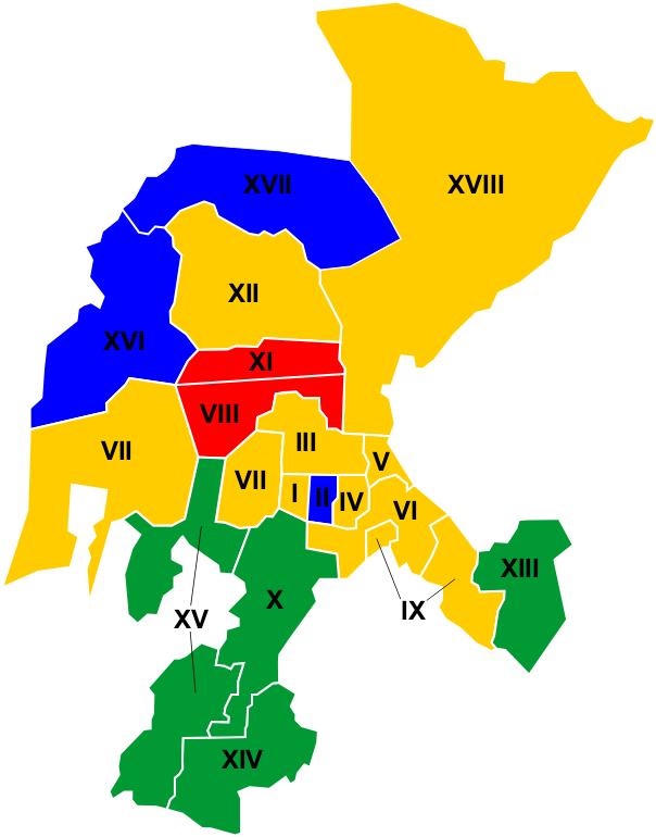 Resultados de la elección a Diputados por partido político en el estado de Zacatecas, México en 2007.